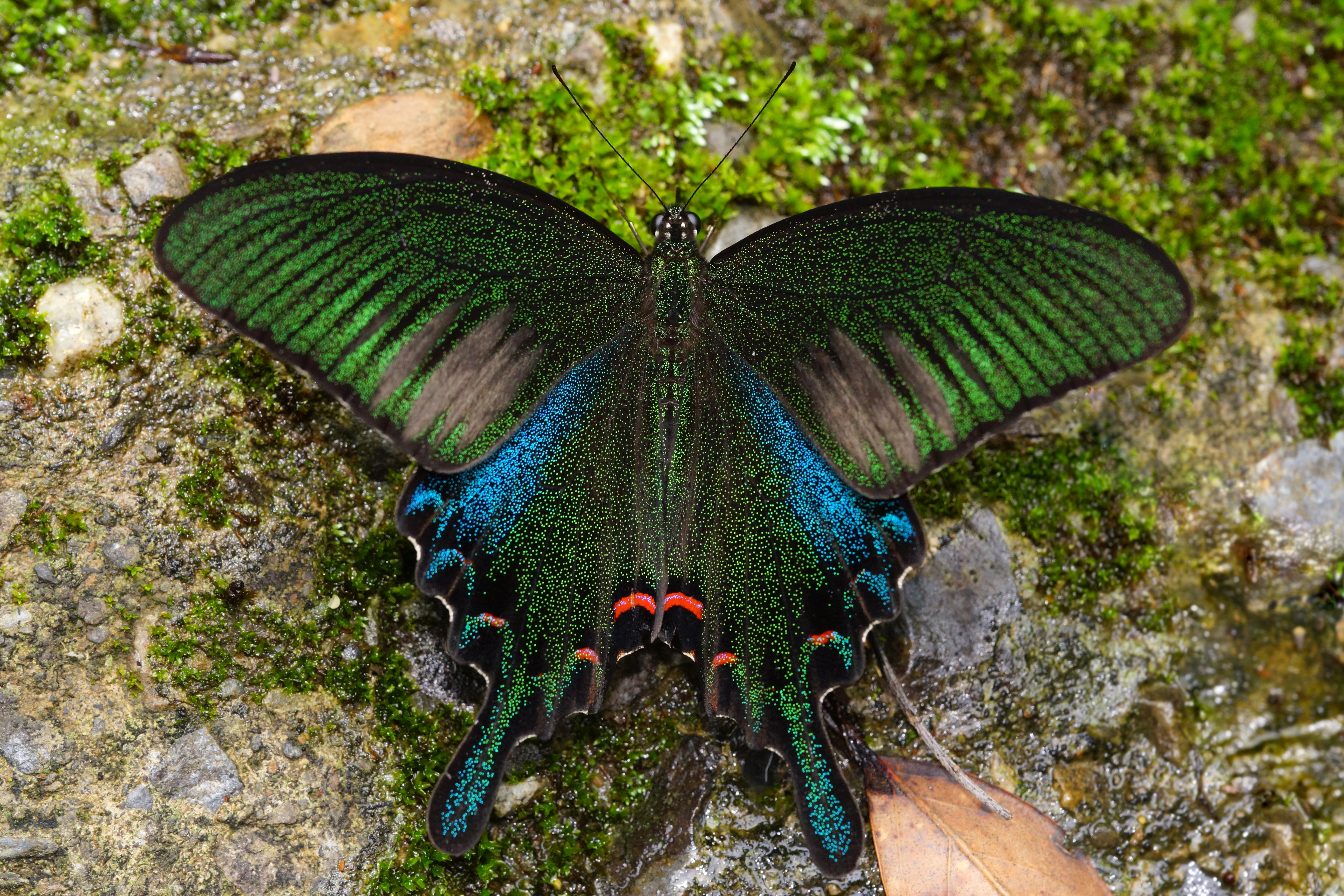 翠鳳蝶 Papilio bianor thrasymedes